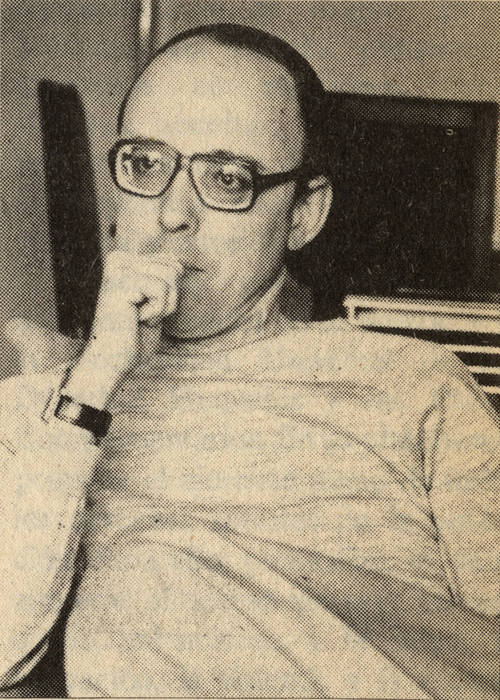 Jaime Jorge Guzmán Errázuriz (Santiago, 28 de junio de 1946 - Ibídem, 1 de abril de 1991) fue un político, abogado constitucionalista y profesor universitario chileno. Senador de la República y colaborador, en asuntos jurídicos y políticos, del Régimen Militar de Augusto Pinochet,1 participó también en la redacción de la Constitución de 1980 y de sus leyes complementarias, y fue fundador del partido Unión Demócrata Independiente (UDI), del Movimiento Gremial de la Universidad Católica y de la revista Realidad.